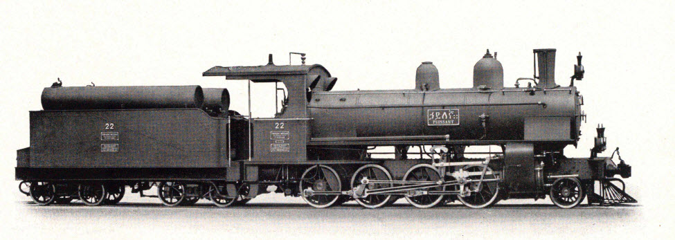 4/5 gekuppelte 2 Zylinder-Compound-Lokomotive Nr. 22 für die Äthiopischen Bahnen. Cropped version of SBB Historic - 014 - 4 5 gekuppelte 2 Zylinder-Compound-Lokomotive für die Äthiopischen Bahnen.tif